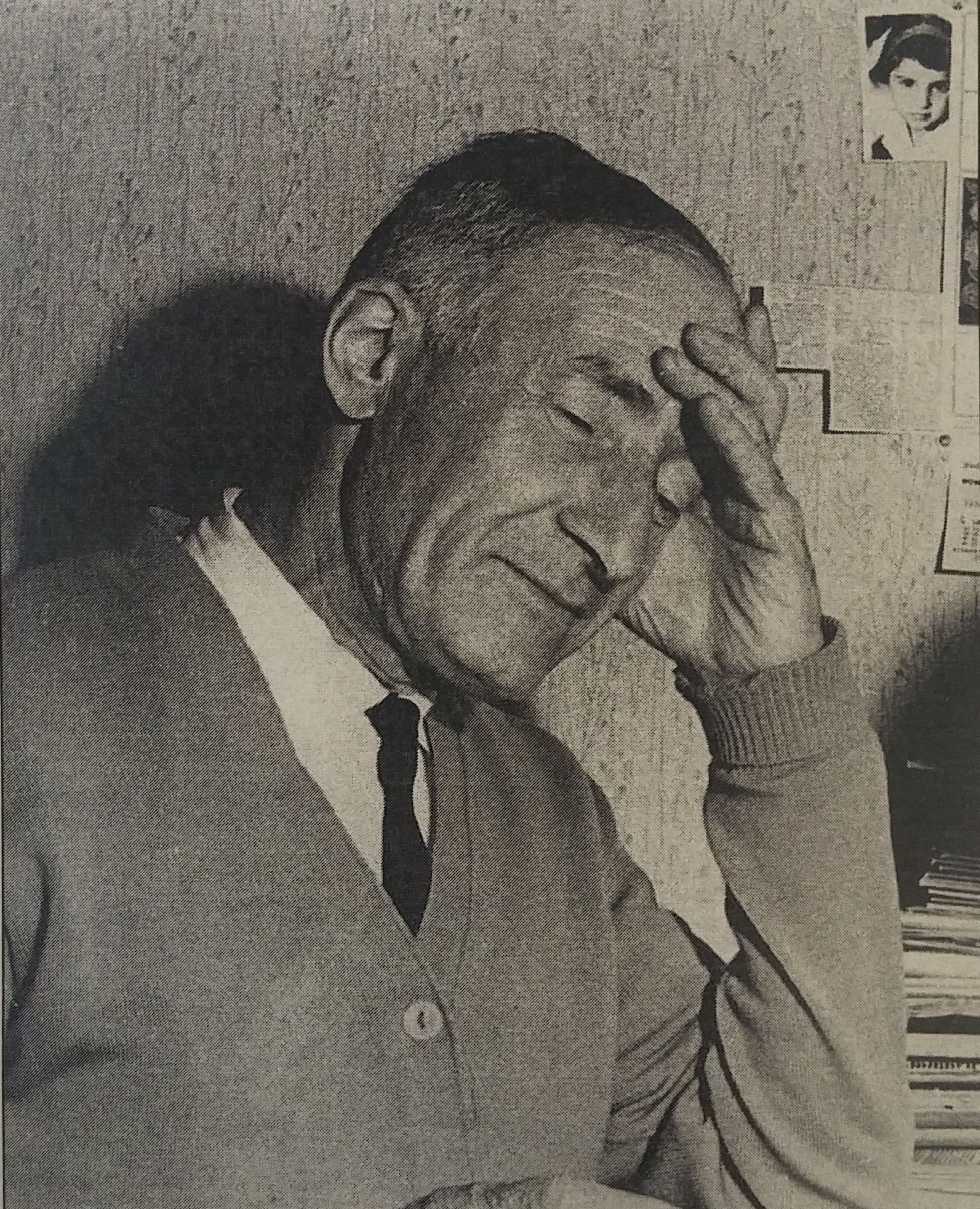 הסופר צבי פרייגרזון